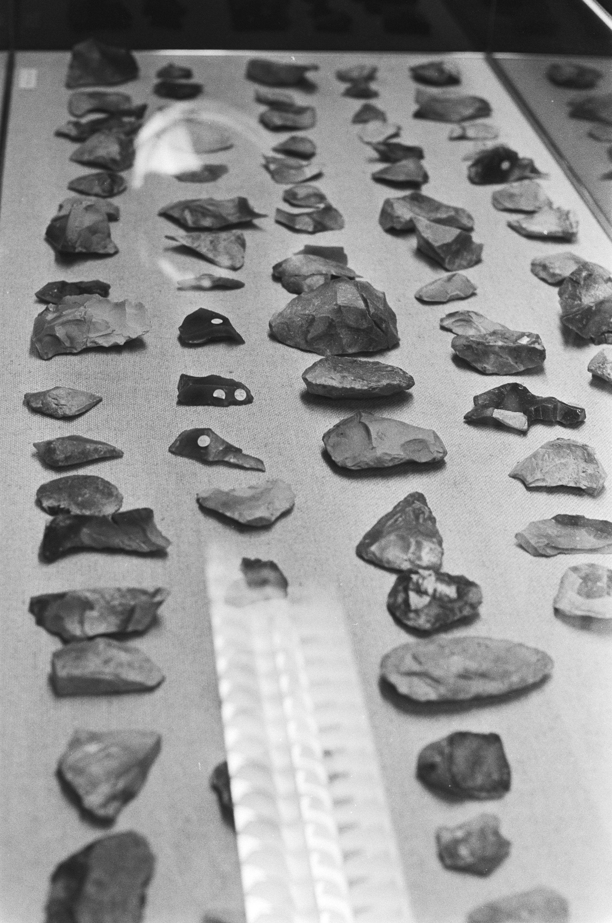 Collectie / Archief : Fotocollectie Anefo Reportage / Serie : [ onbekend ] Beschrijving : Expositie van fel omstreden collectie archeologische vondsten van Tjerk Vermaning in Drents Provinciaal Museum in Assen Datum : 17 maart 1982 Locatie : Assen Trefwoorden : Collecties, Exposities, STENEN, musea Persoonsnaam : Vermaning, Tjerk Fotograaf : Smirren, […] van / Anefo Auteursrechthebbende : Nationaal Archief Materiaalsoort : Negatief (zwart/wit) Nummer archiefinventaris : bekijk toegang 2.24.01.05 Bestanddeelnummer : 932-0470